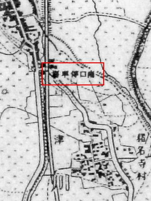 明治十八年測量大日本帝国陸地測量部地図より「南口停車場」の位置を示す。